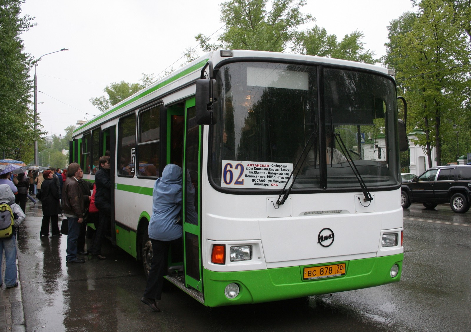 Томский автобус ЛиАЗ-5256 маршрута 62 на остановке "Университет". в день маршрутного кризиса